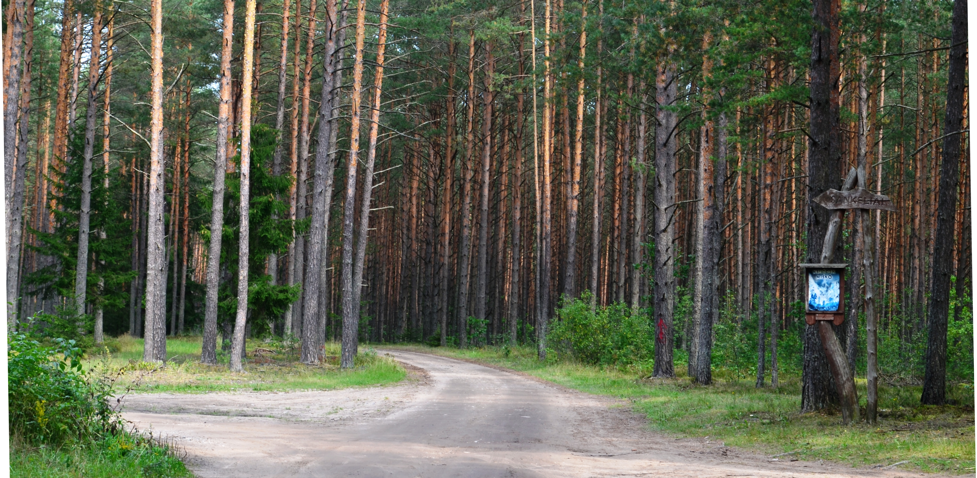 Rodyklė į Sankelius, Nemenčinės-Lavoriškių miškai, Vilniaus raj.